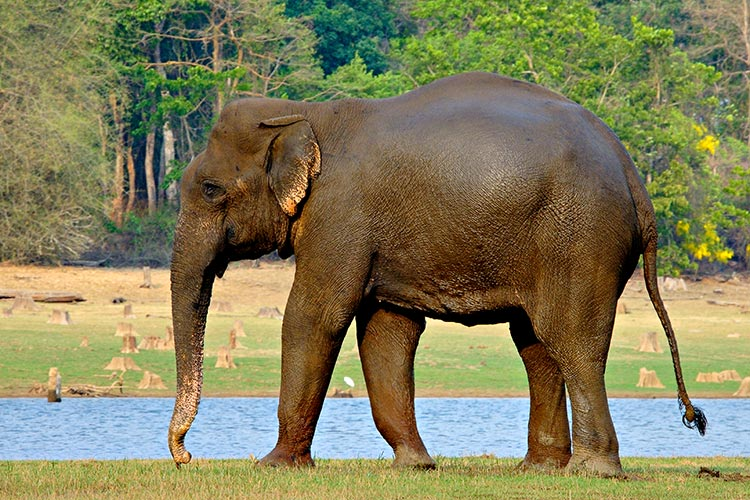 After a swim Nagarhole National Park, Karnataka, India March 2007